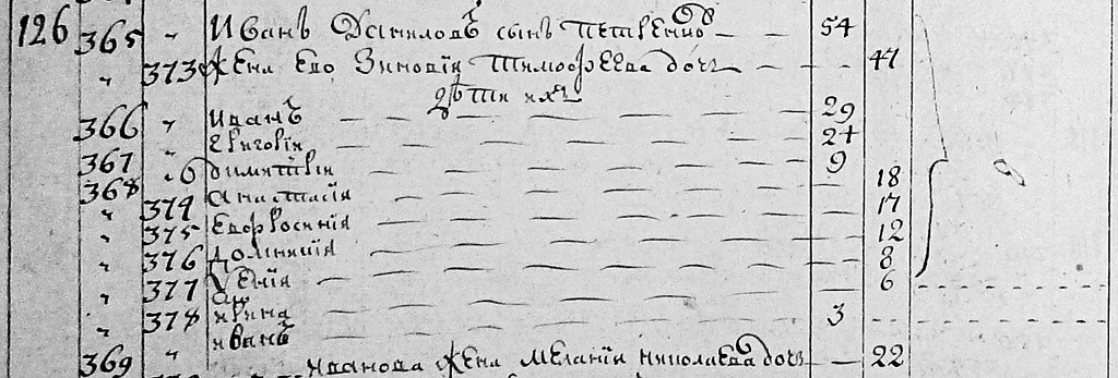 Прадіда Михайла Петренка діти